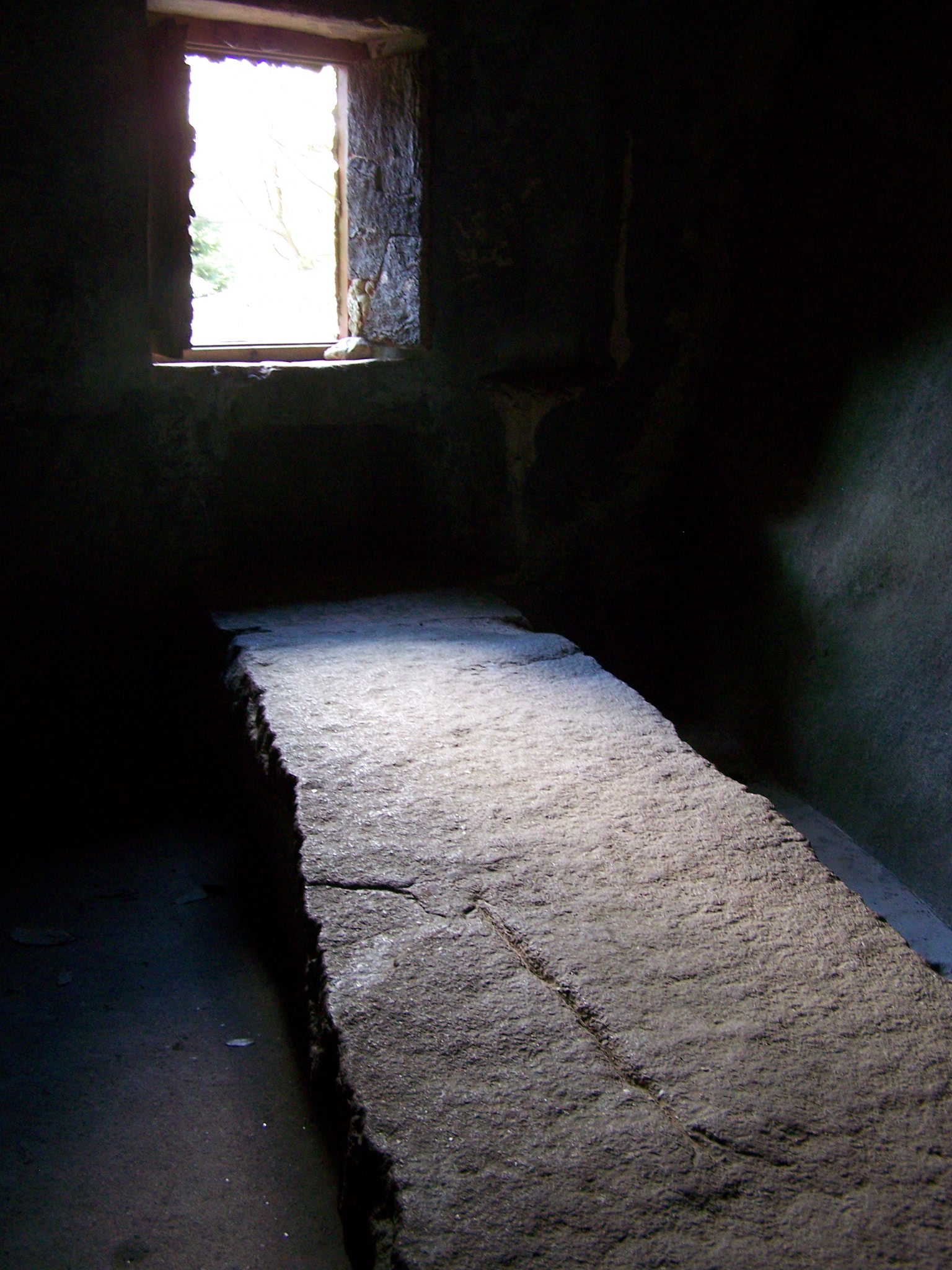 Convento dos Capuchos, Refeitório, Sintra, Portugal.